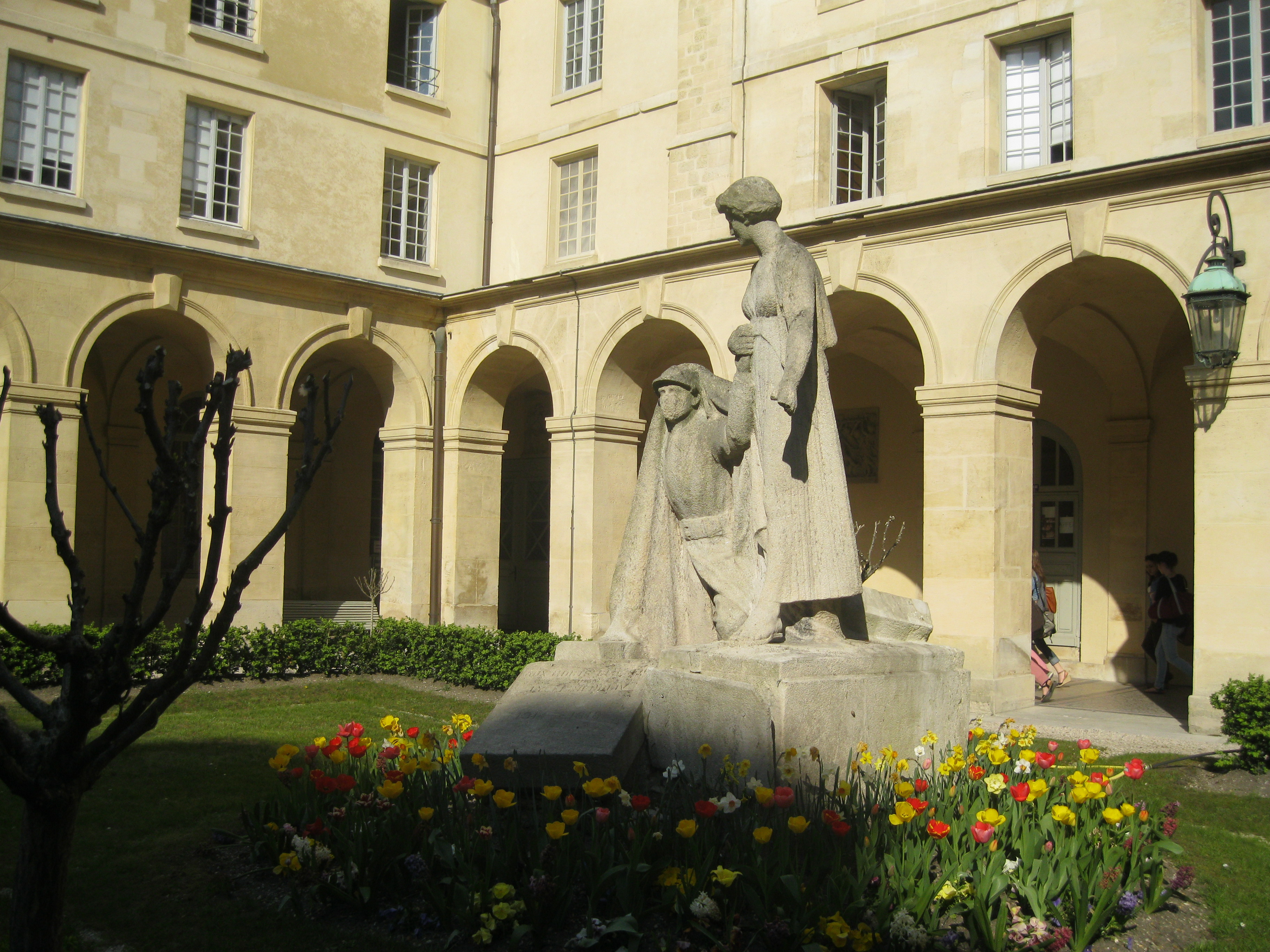 Monuments aux élèves morts au fronts pendant la guerre de 1914-1918, dans le cloître du lycée Henri-IV